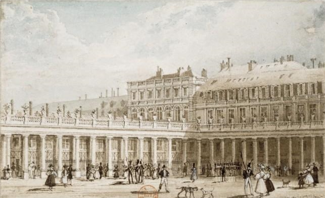 Cour d'honneur du Palais Royal et galerie d'Orléans, Paris, 1829. Dessin à la plume et lavis d'encre brune, aquarelle, 8,7 x 14,4 cm, par Frederick Nash (1782-1856), en provenance de la collection Hippolyte Destailleur.